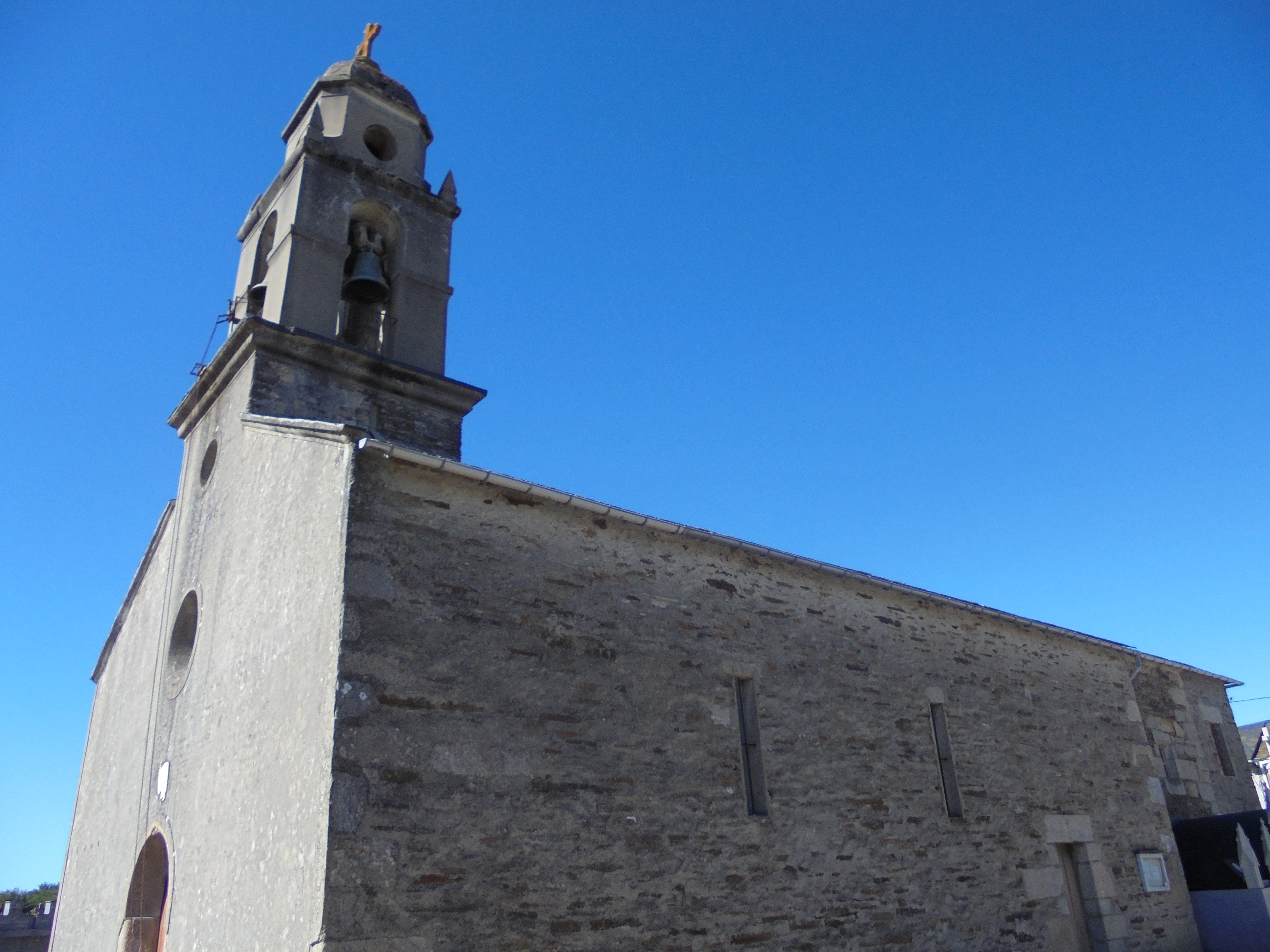 Igrexa parroquial de Bóveda ( Lugo)